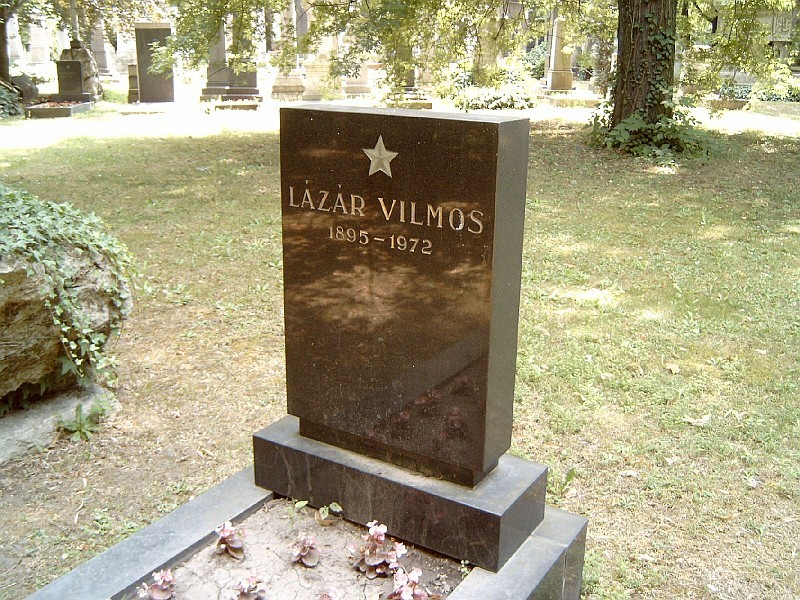 Lázár Vilmos (Kaposvár, 1895. szept. 4. – Bp., 1972. júl. 26.): mezőgazdász sírja Budapesten. Kerepesi temető: 34/2-1-21.